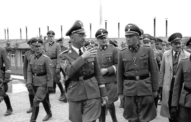 Information added by Wikimedia users.Himmler, Karl Wolff, Franz Ziereis and August Eigruber